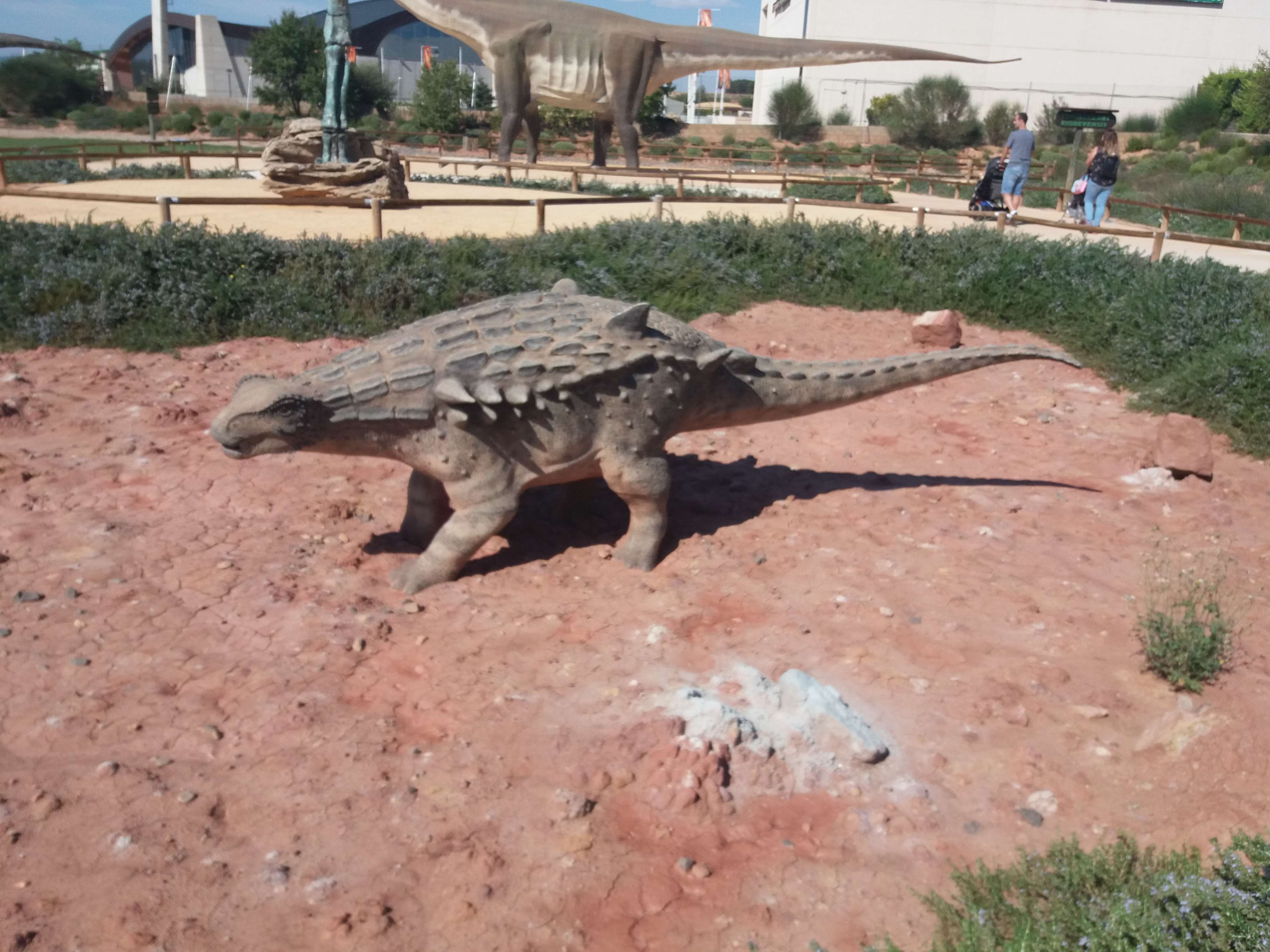 Réplicas de dinosaurios en Dinópolis (Teruel - España).